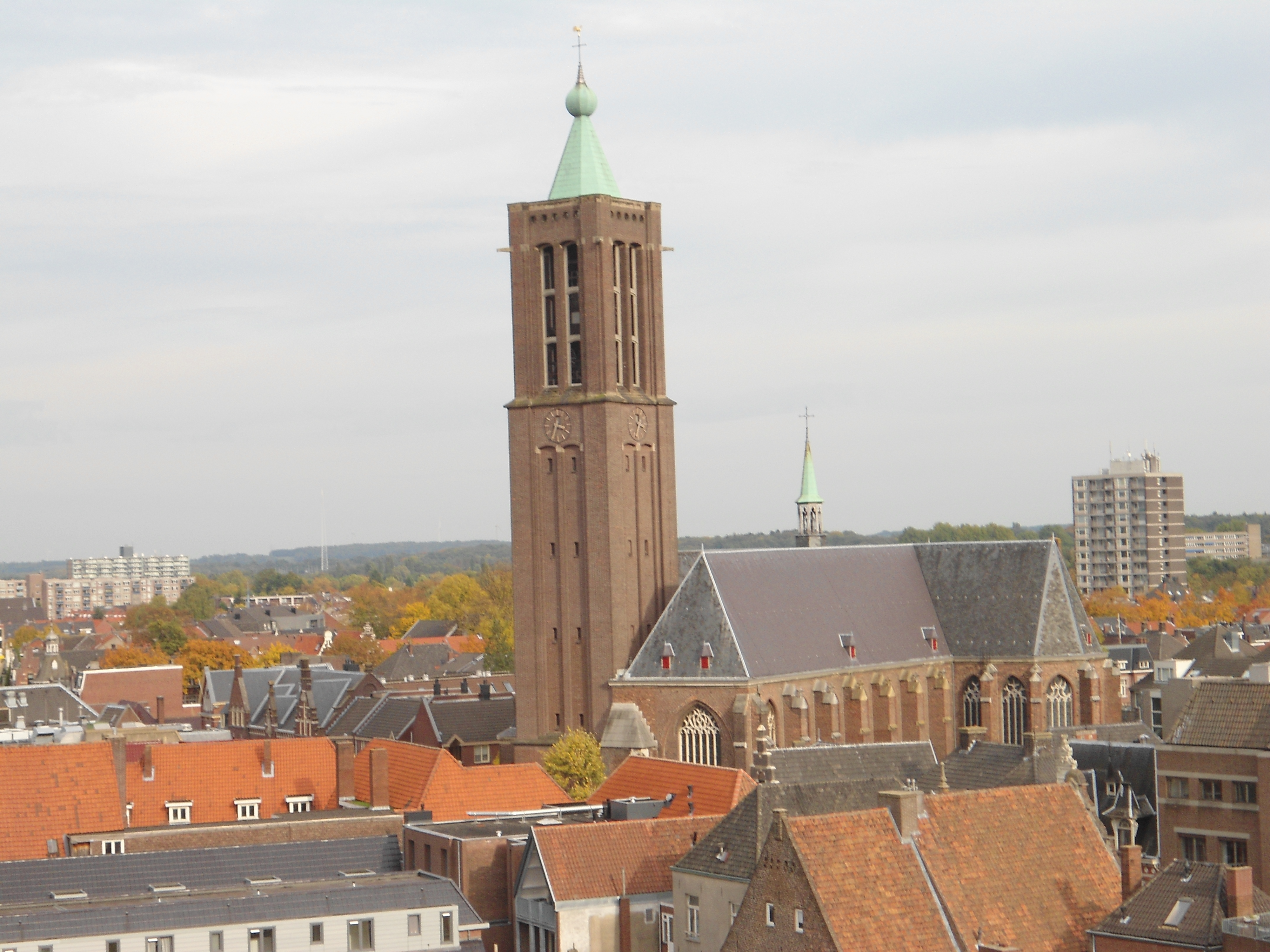 De Sint-Martinuskerk te Venlo